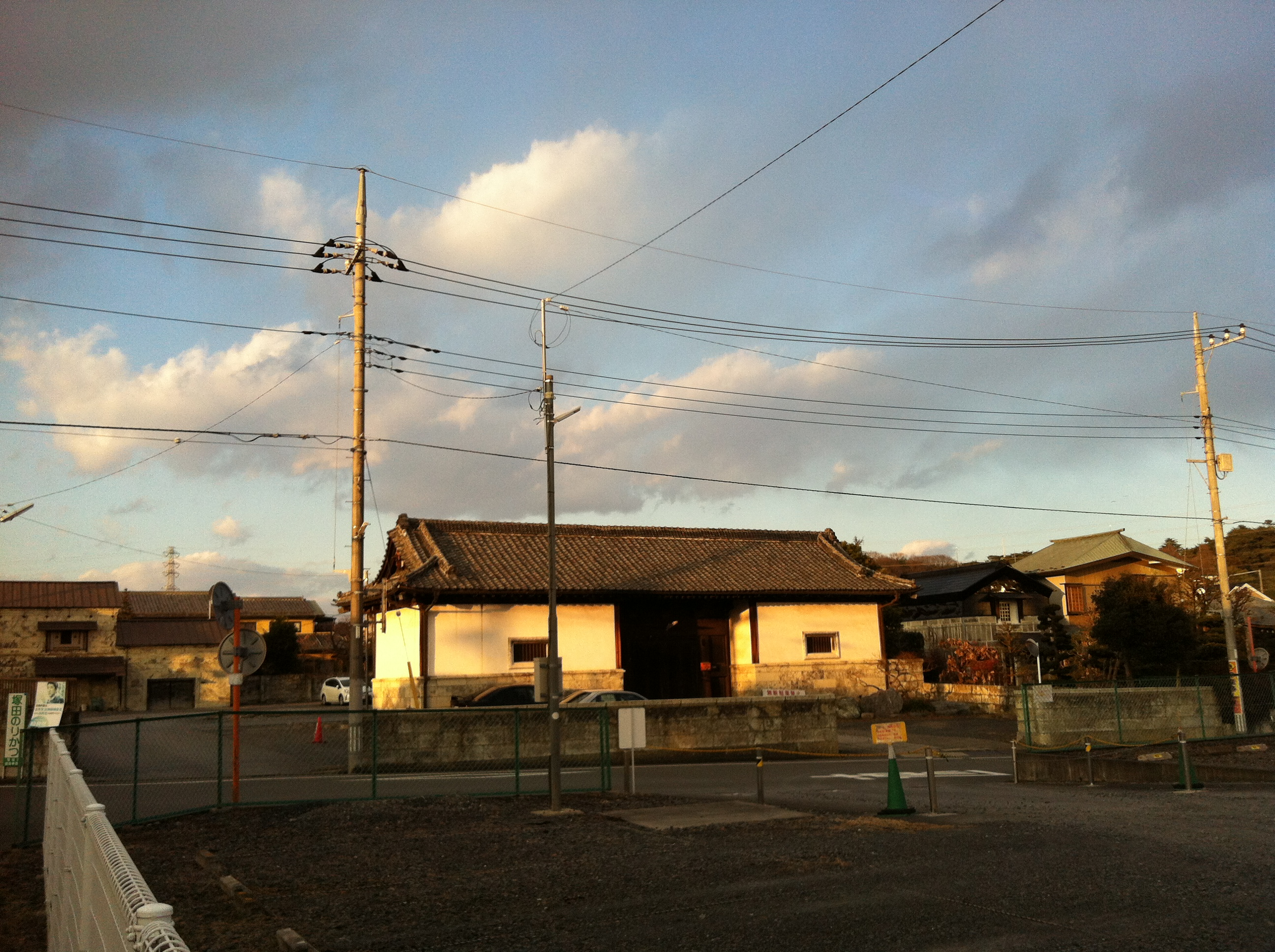 江戸時代建造の中村氏館跡の正門。2017年現在は栃木放送駐車場の一部になっている。